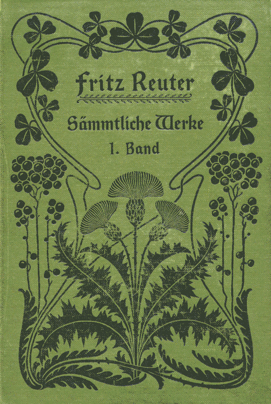 Titel F. Reuter Volksausgabe 8 Bd. 1902